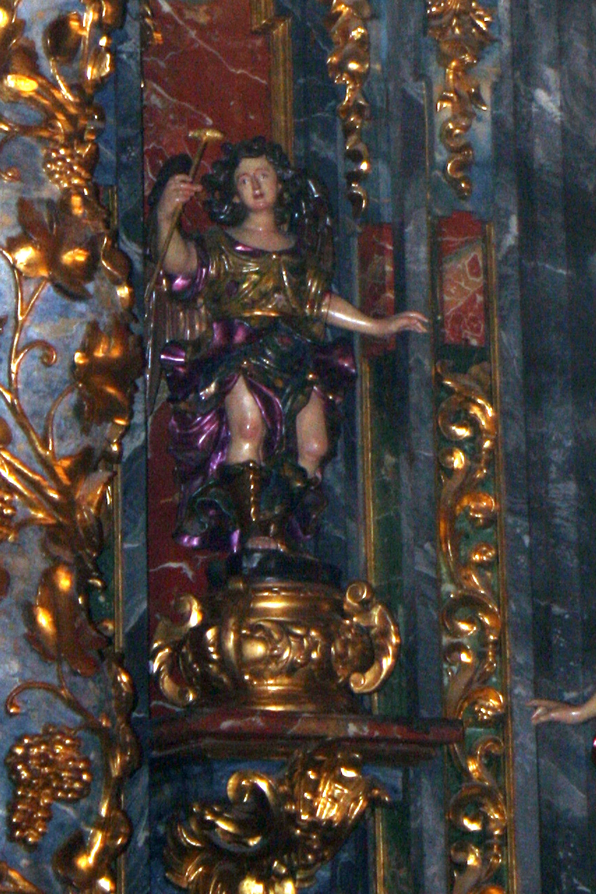 Ángel pasionario, talla policromada a tribuida a Luisa Roldán, retablo de la capilla del Cristo en la colegiata de San Isidro, Madrid.